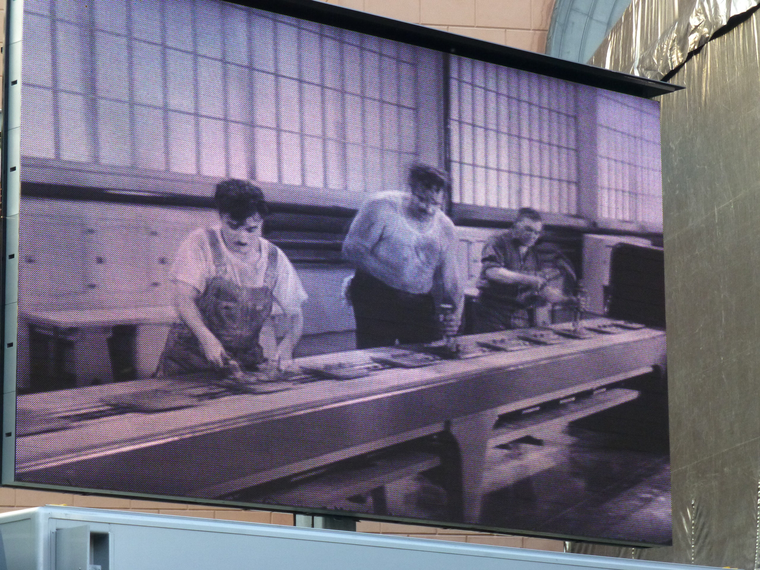 Open-Air-Konzert des Sinfonieorchester Wuppertal am 12. Juli 2013 ab 20:00 auf dem Laurentiusplatz, Wuppertal. Geboten wurde Stummfilm & Livemusik, Charlie Chaplin: "Modern Times"